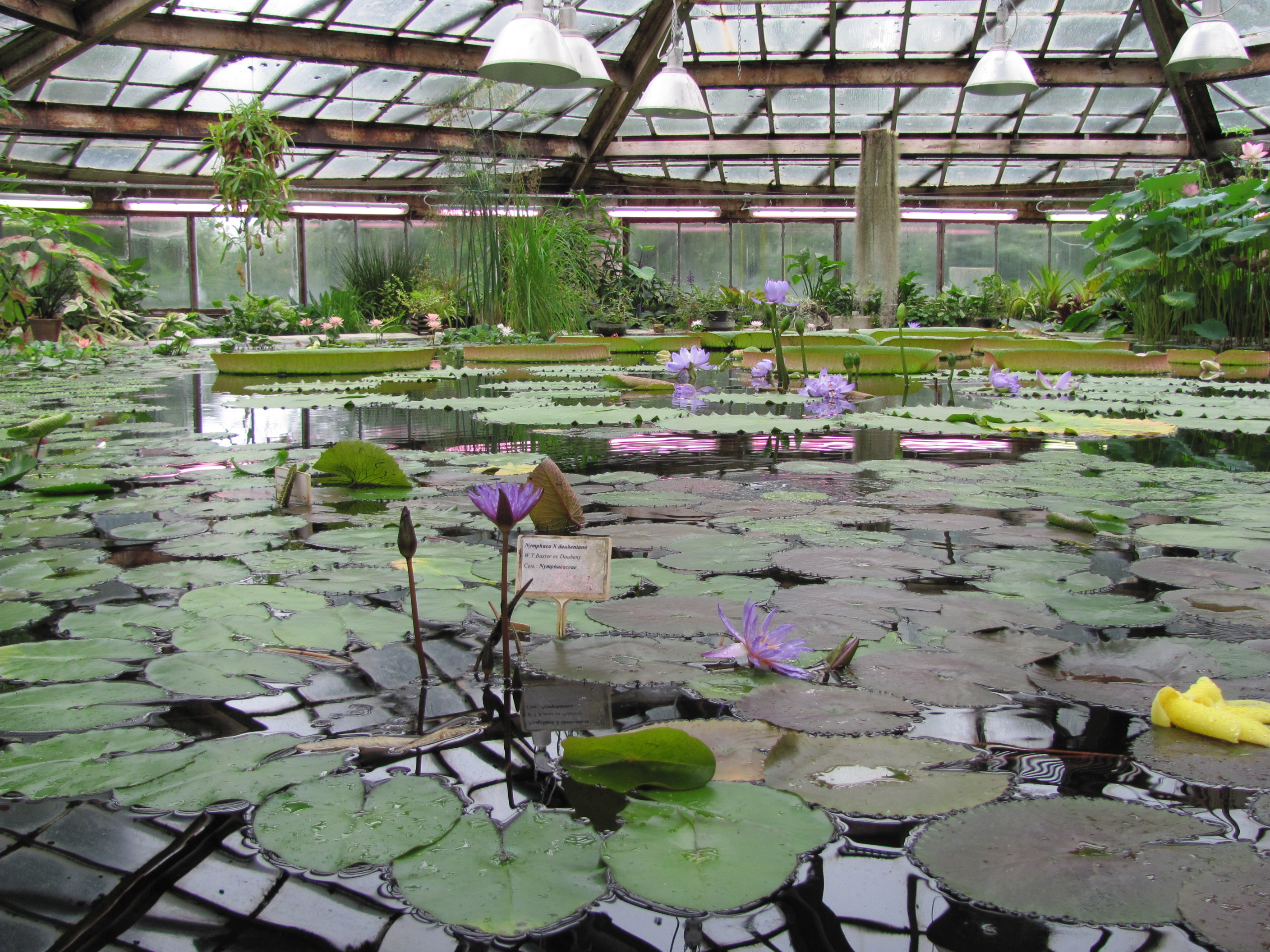 Ботанический сад Российской академии наук, осень 2011 г. (Водная "викторная" оранжерея, построена для демонстрации викториа амазоника, самой крупной кувшинки в мире. Помимо виктории, в оранжерее представлены разнообразные кувшинки, лотосы, прибрежные тропические растения)